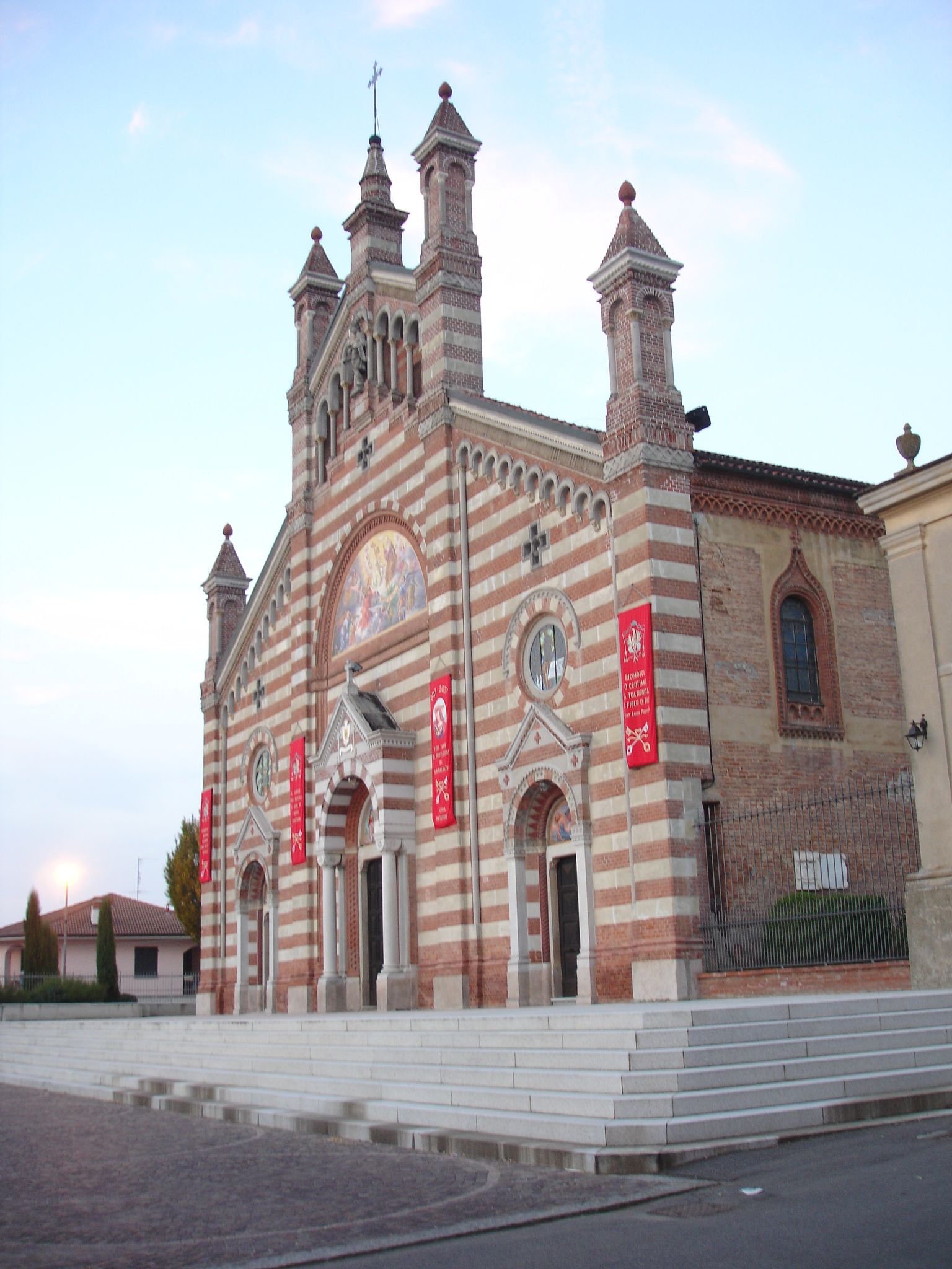 Autore: Tony Frisina. Foto eseguita il 22 Settembre 2007